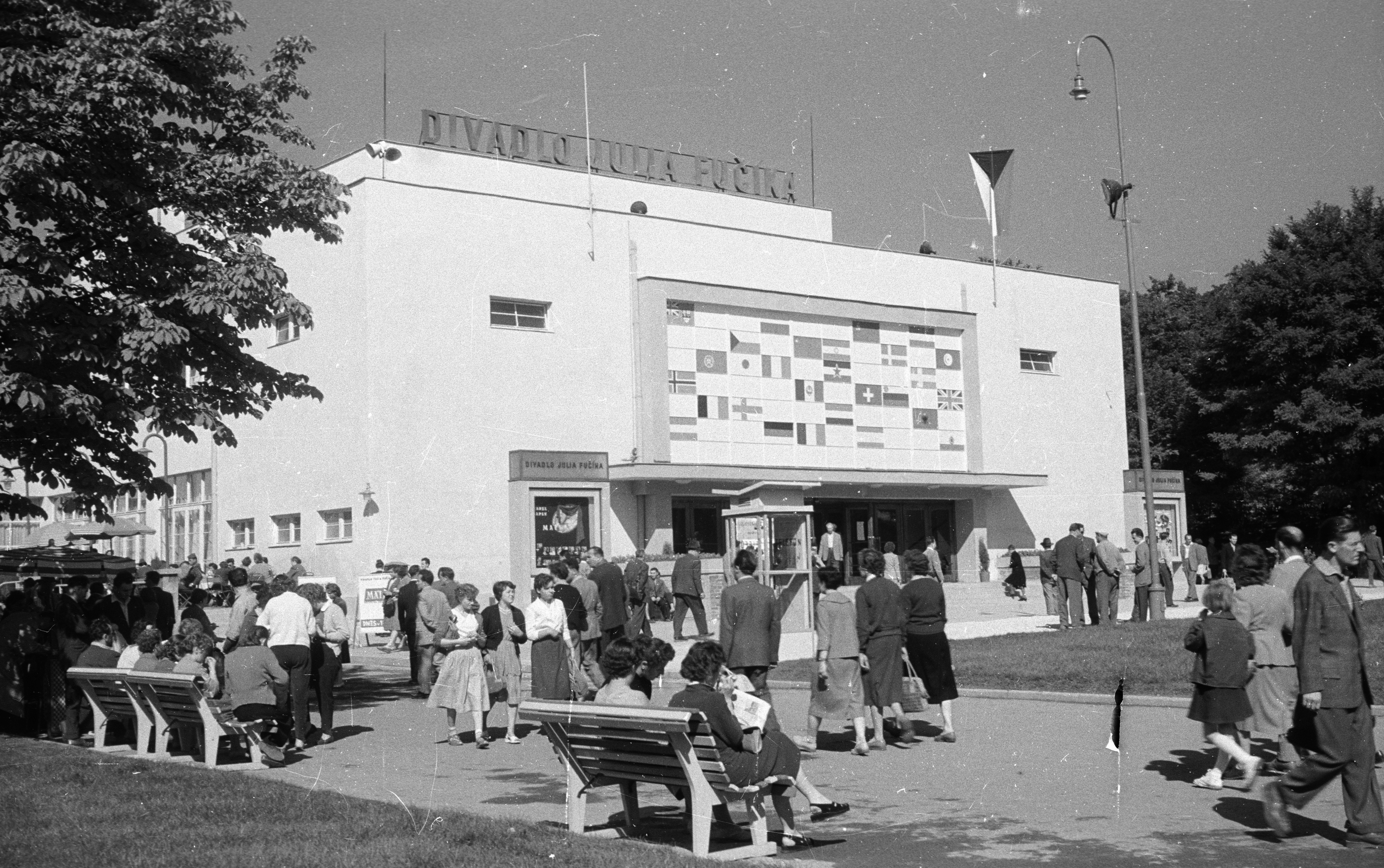 Vásárváros, Brnói Nemzetközi Vásár. A Julius Fucik Színház (ma Divadlo na Vystavisti) épülete. Location: Czech Republik, Brno Tags: Czechoslovakia, international fair, theater, flag pole, flag, lamp post Title: Vásárváros, Brnói Nemzetközi Vásár. A Julius Fucik Színház (ma Divadlo na Vystavisti) épülete.